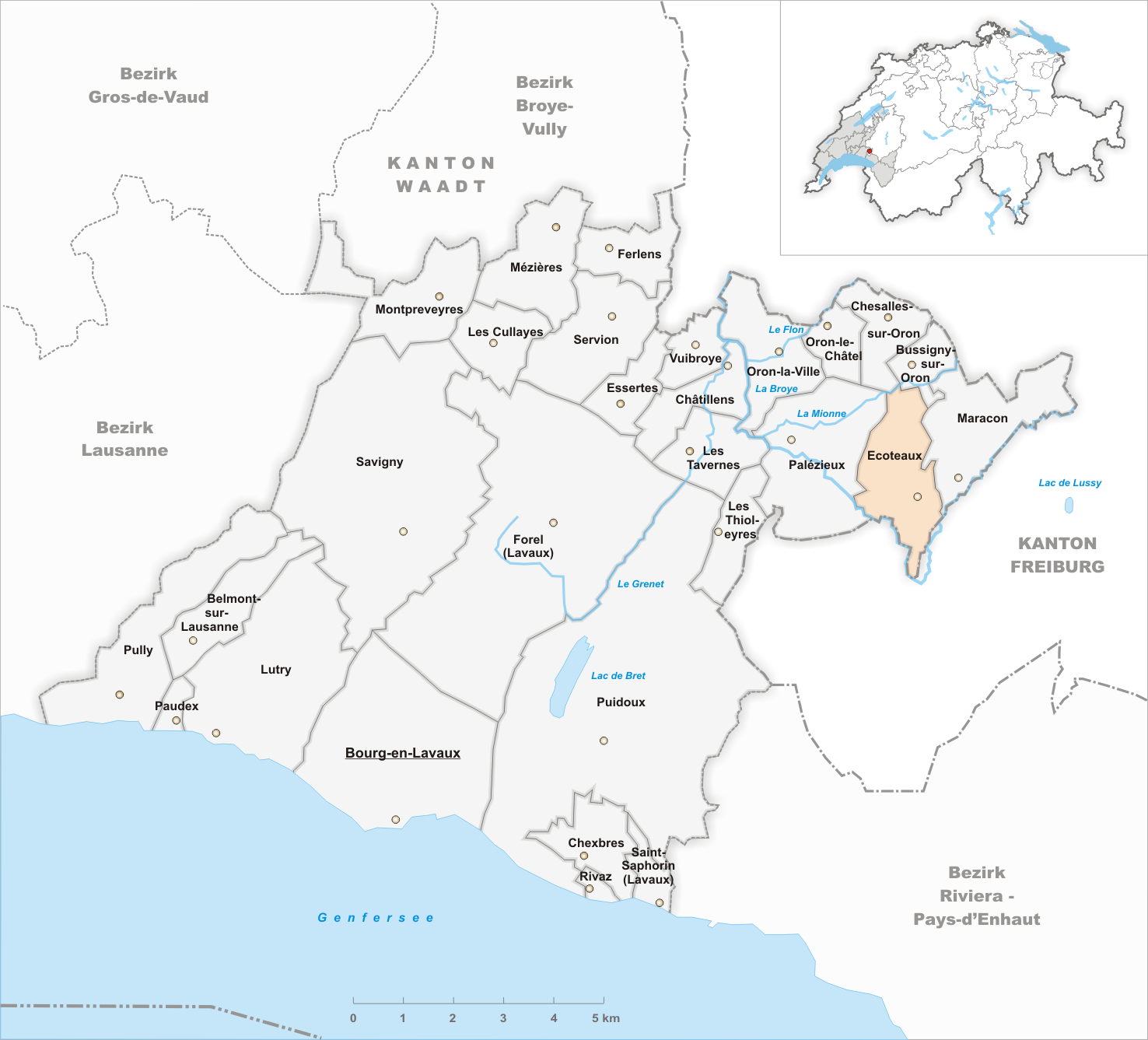 Municipality Ecoteaux